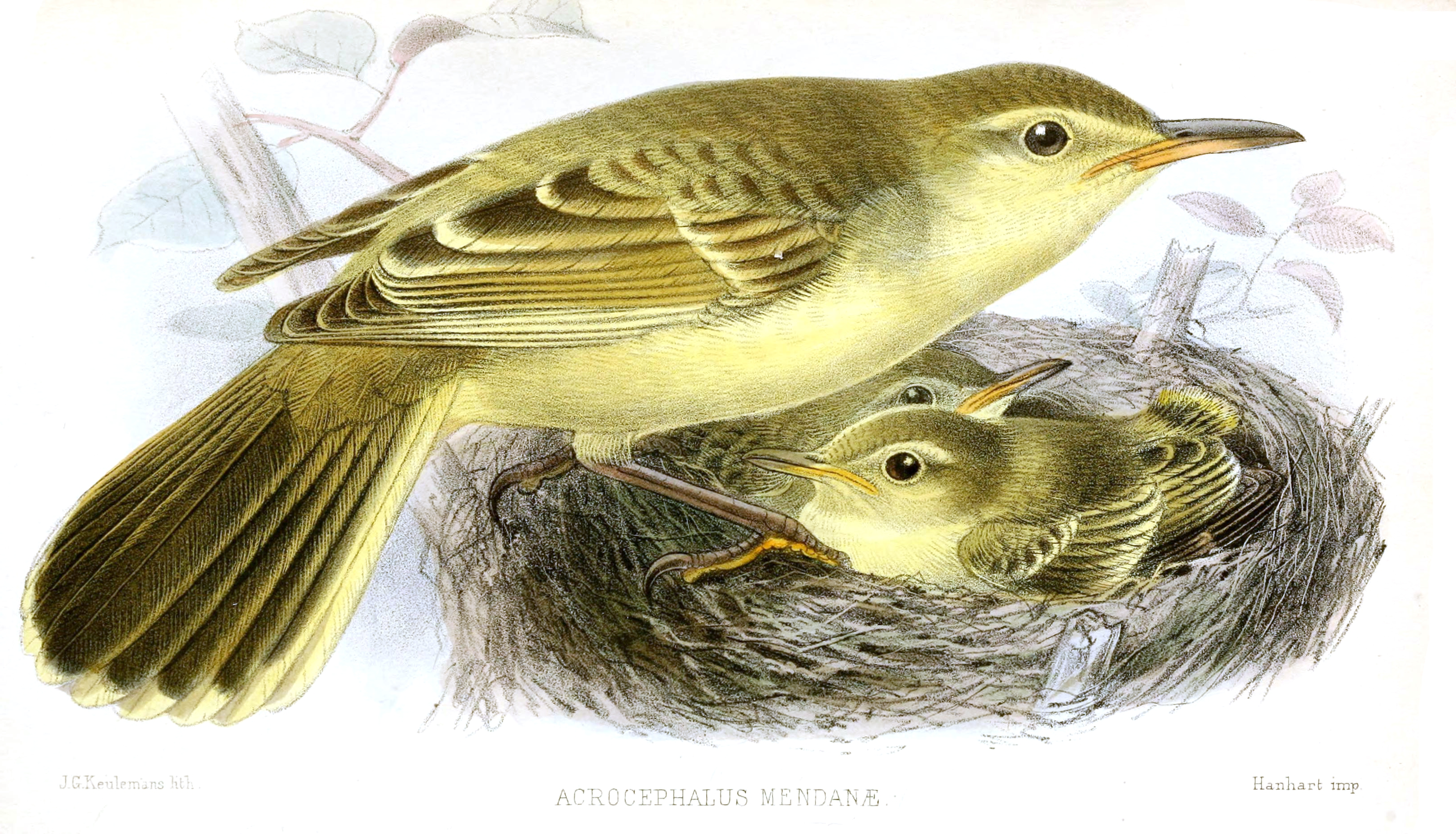 Acrocephalus mendanae